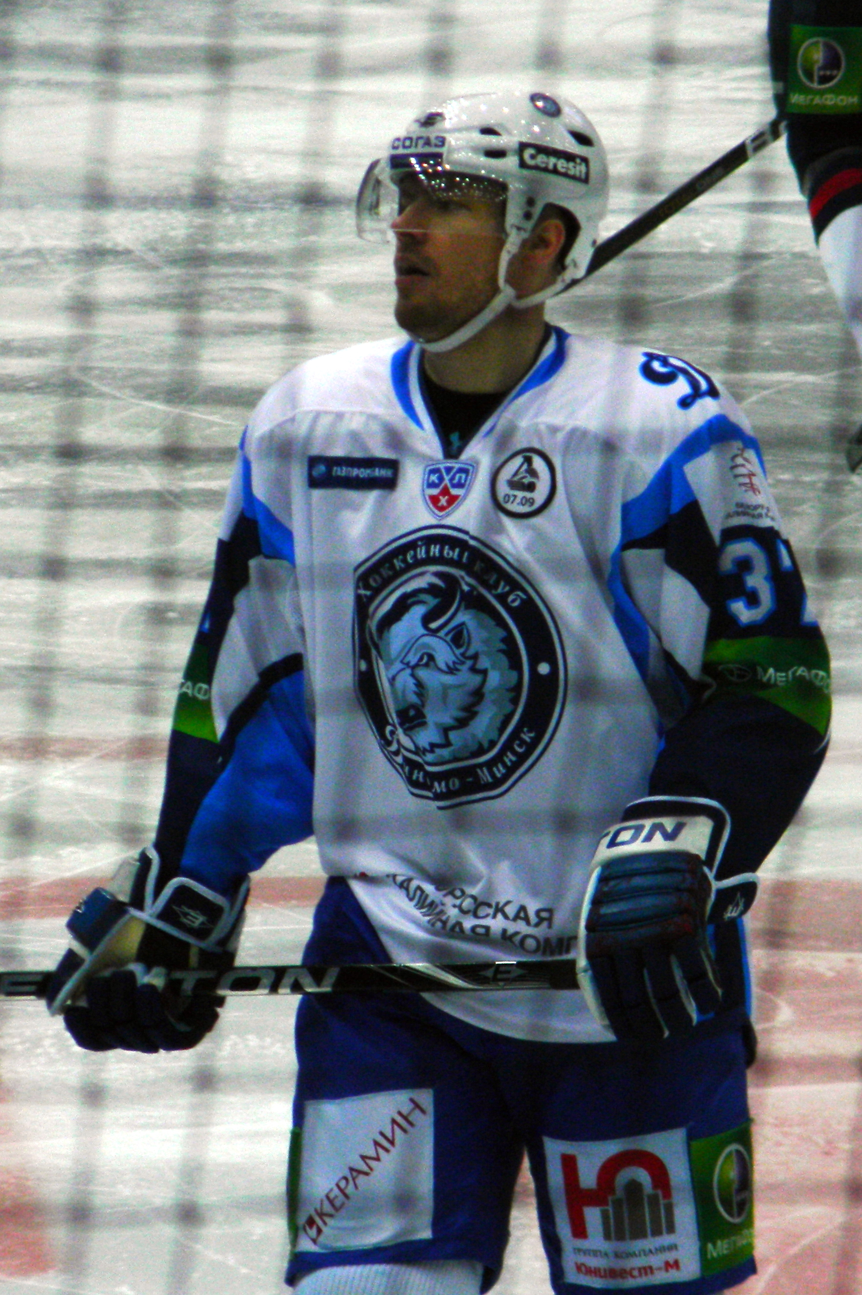 Peter Podhradský, a Slovask ice hockey player from Dinamo Minsk